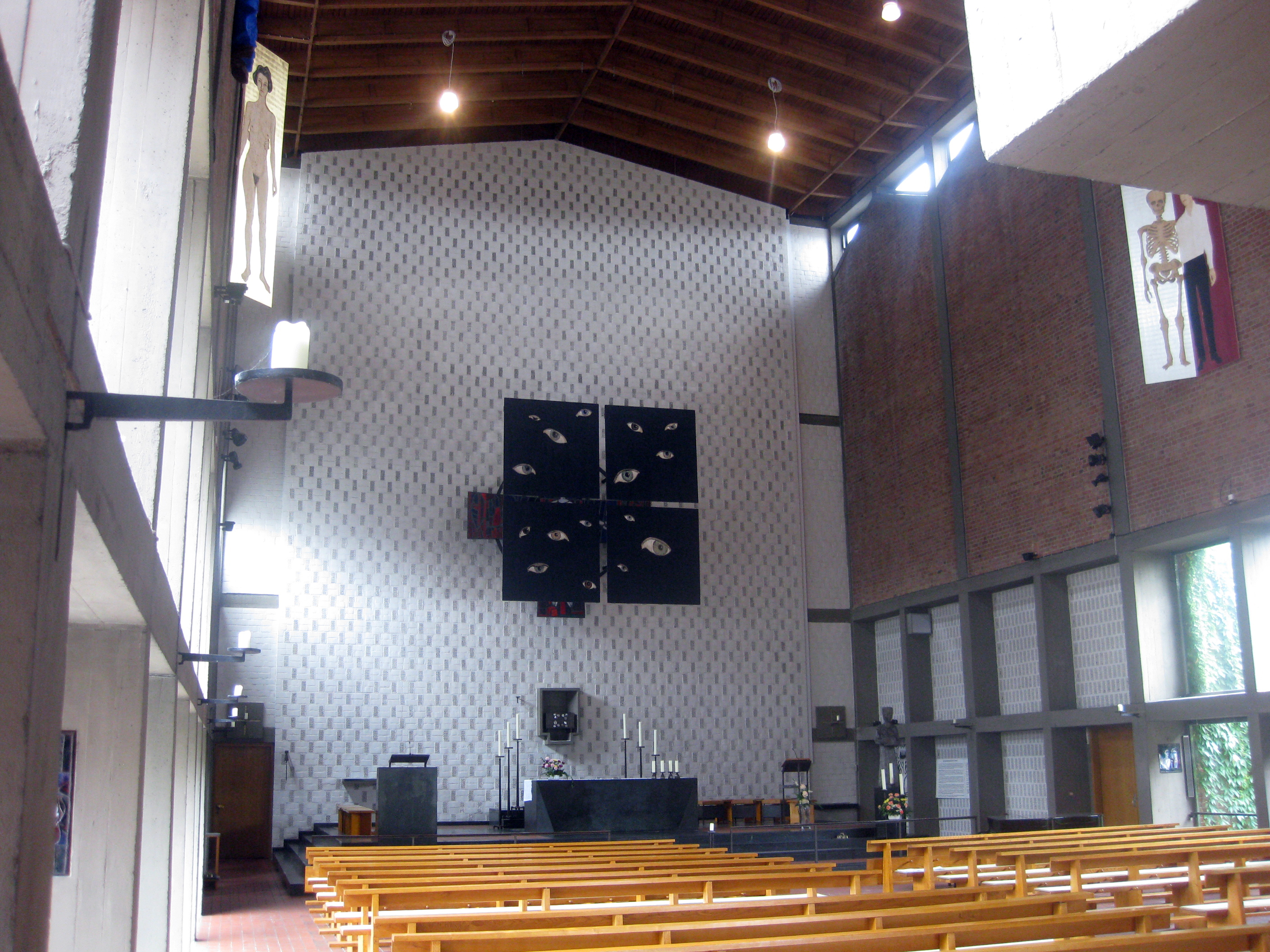 Altar, St.Elisabeth Kassel